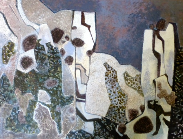 Au dessus de Saint-Rémy, acrylique et sable sur toile